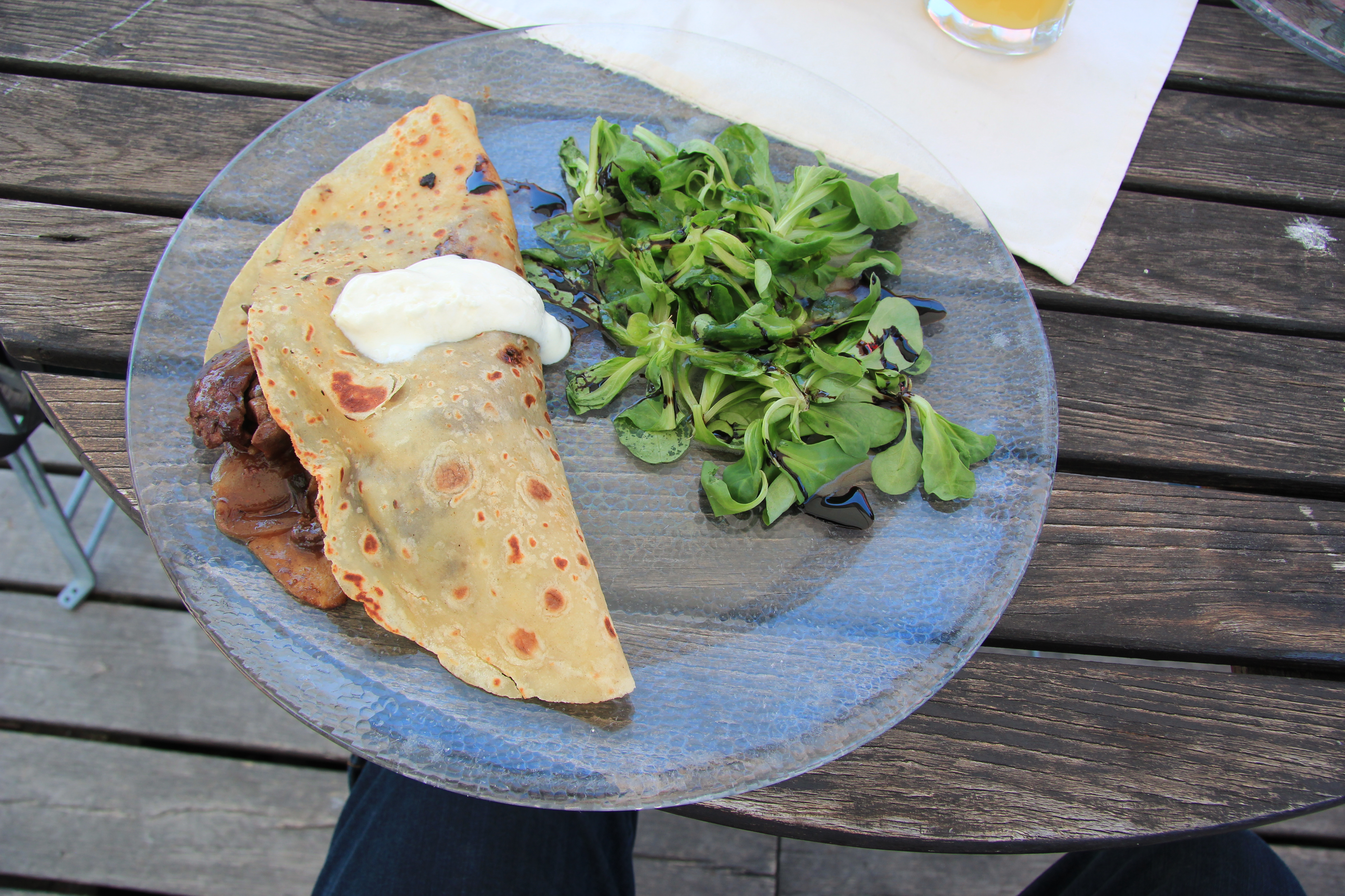 Lokše (Kartoffelfladen) gefüllt mit gedünsteter Hühnerleber und Andapfelspalten, darüber Brimsen und Vogerlsalat mit Kernöl, serviert in Schloss Hof, Niederösterreich, als slowakisches Gericht